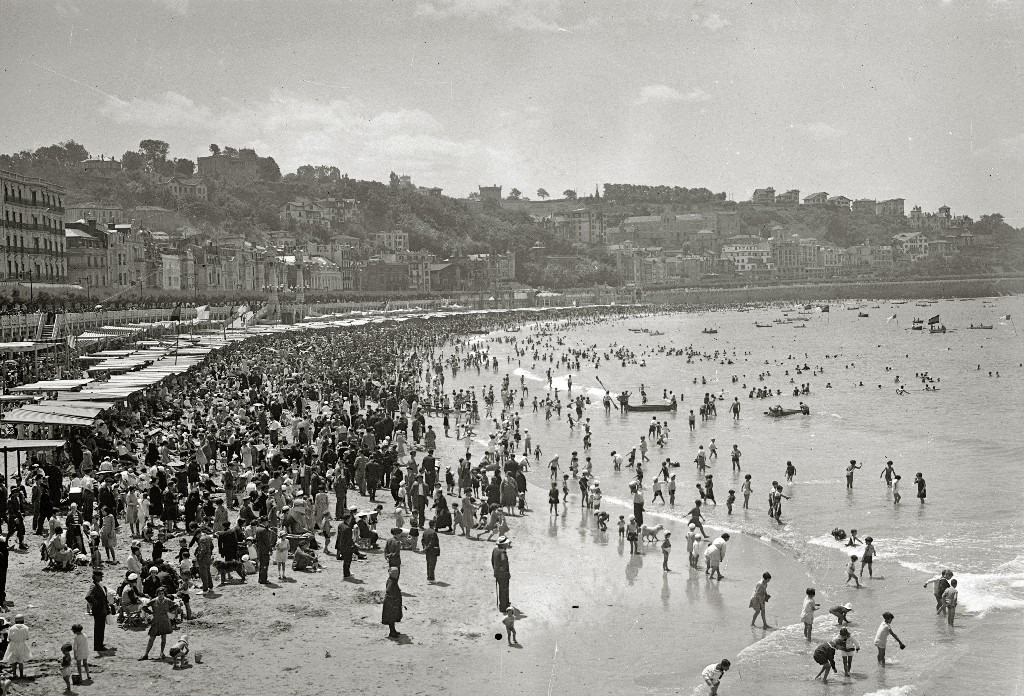 Título original: Escenas en la playa de la Concha (76/95) Localización: San Sebastián (Guipúzcoa)